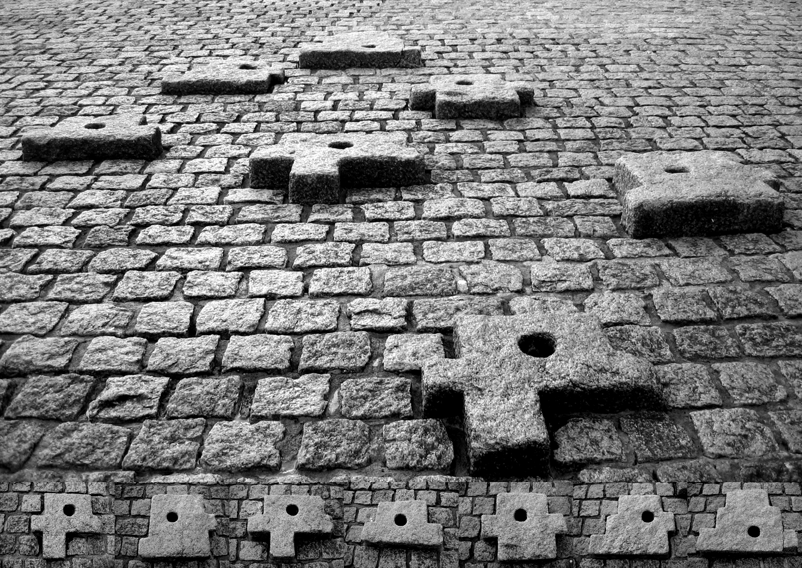 Sifoiak Haizearen Orrazian.